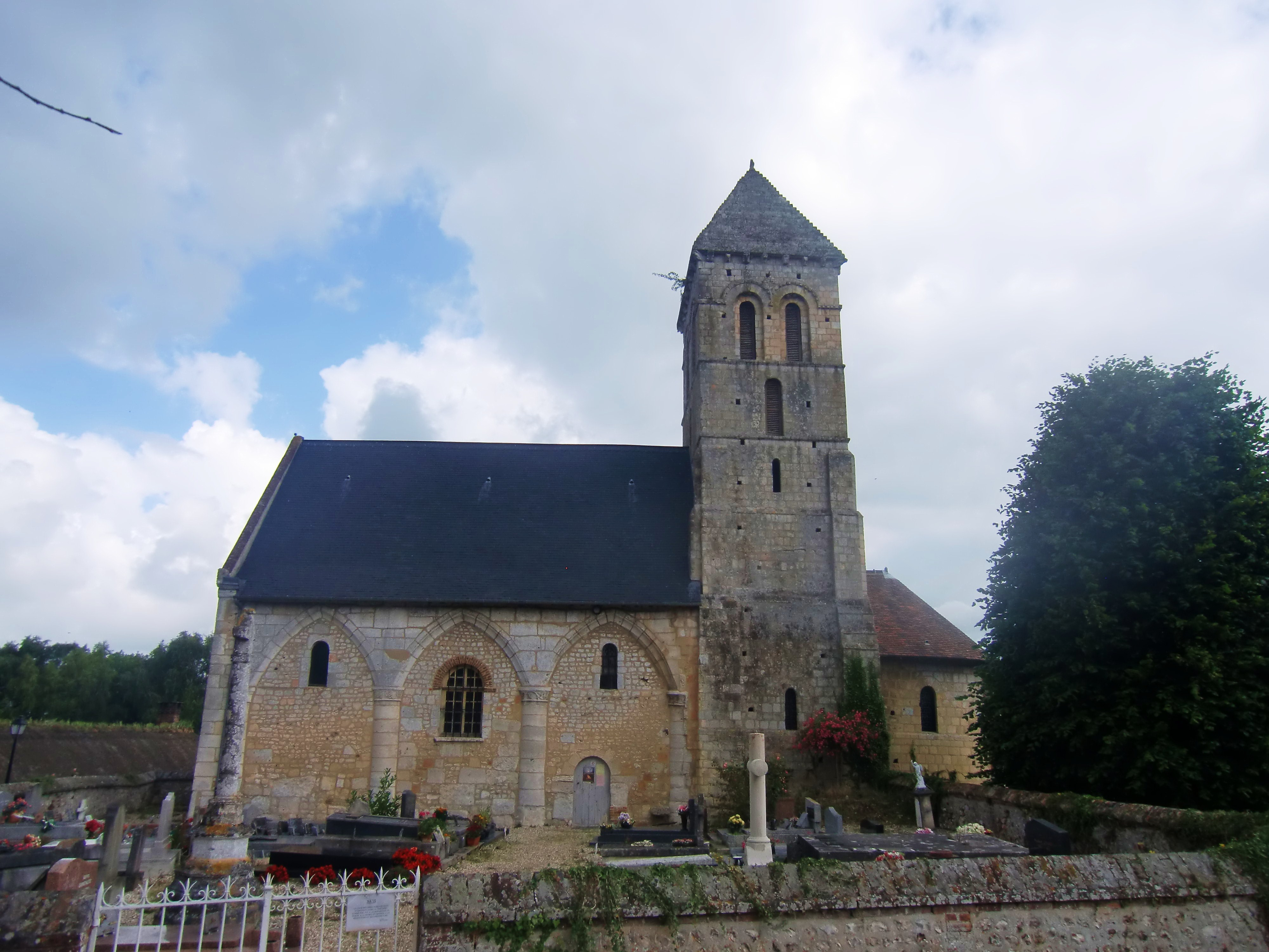 Eglise d'Aizier (Eure, Normandie, France)